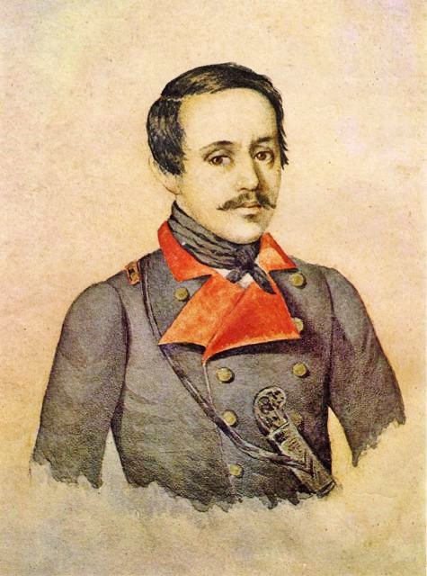 Michail Jur'evič Lermontov nell'ultimo ritratto fattogli in vita, a maggio del 1841. Opera ad acquerello di Kirill Gorbunov